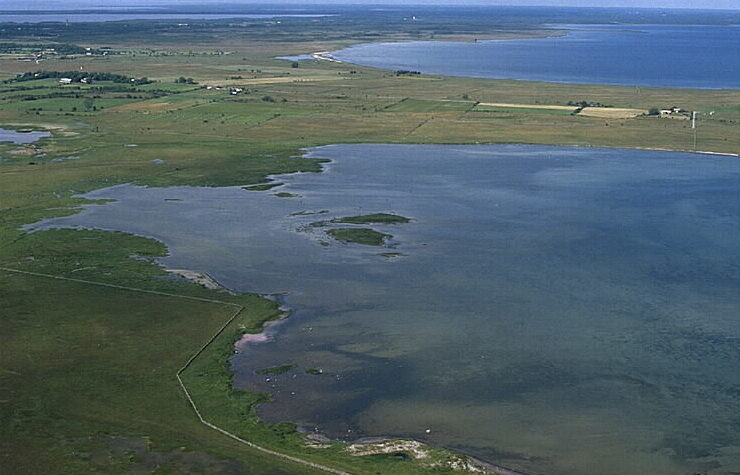 Motiv: Faludden Nyckelord: Flygbilder, Riksintressen Kategori: Kust- och skärgårdsmiljöFaludden